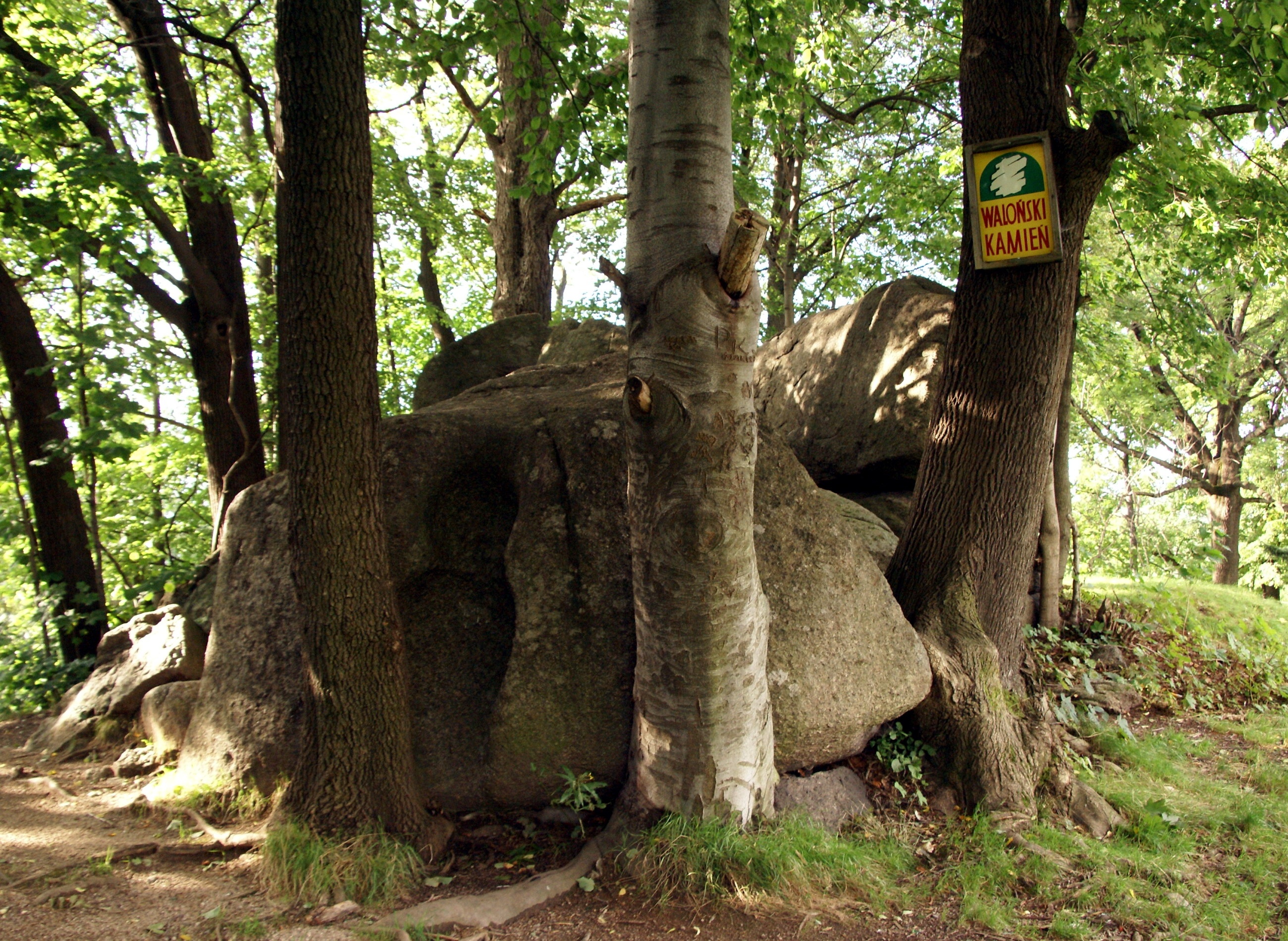 Waloński Kamień we wsi Przesieka, powiat jeleniogórski.